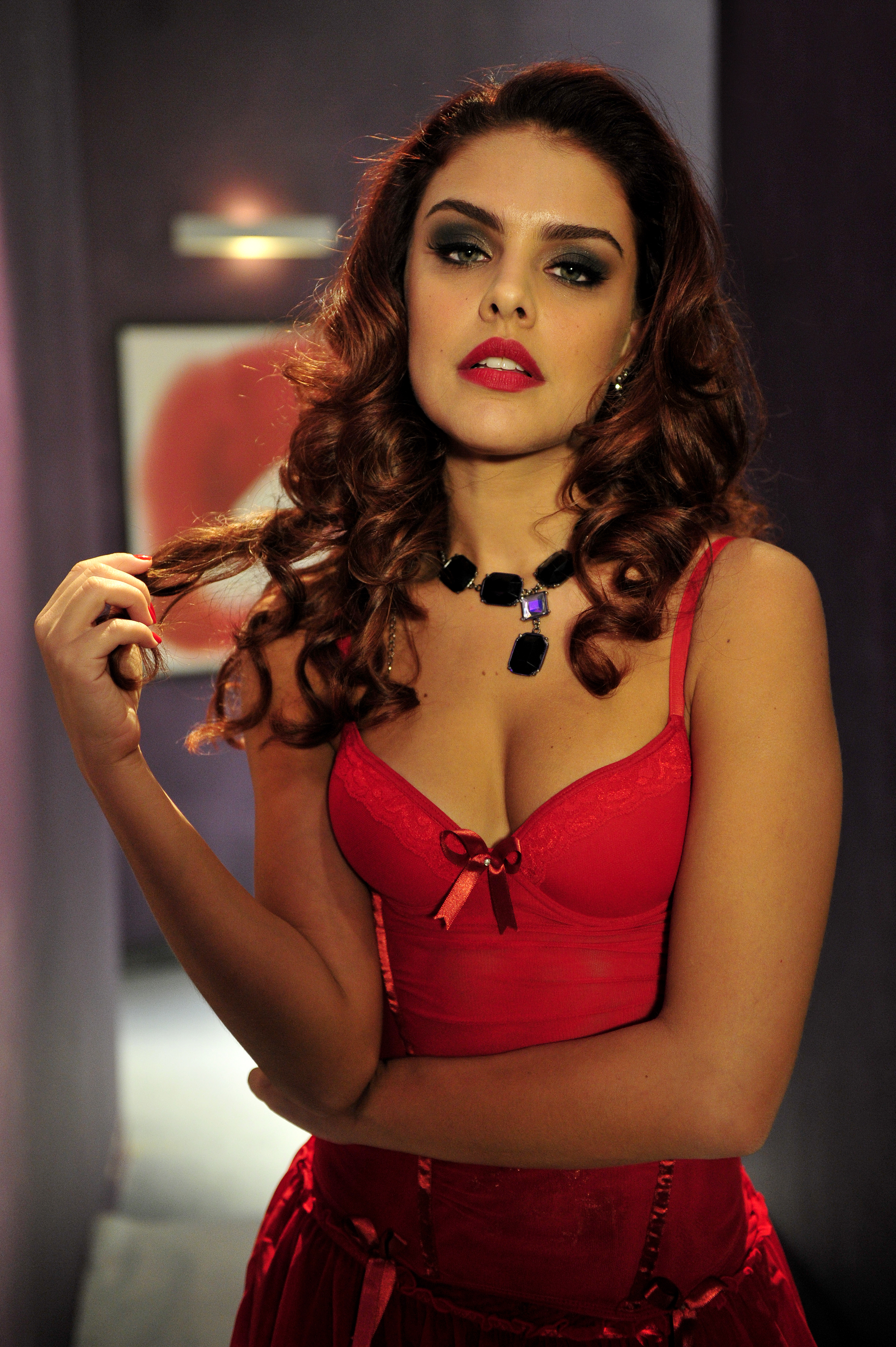 A atriz Paloma Bernardi na telenovela Salve Jorge.